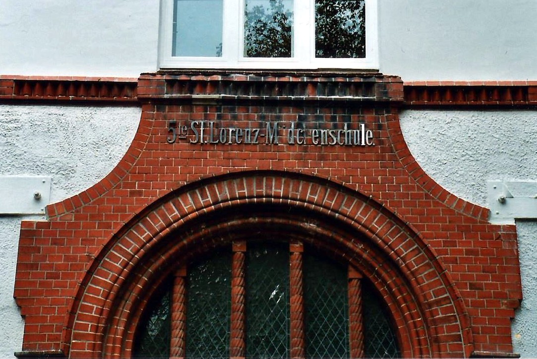 ehemaliger Eingang der Mädchenschule von der 5ten St. Lorenz-Schule. Heute Luther-Schule